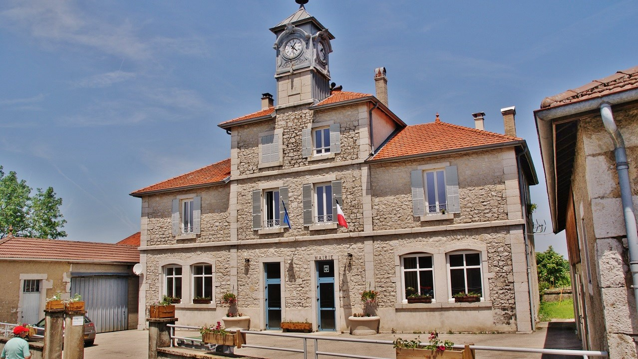 La Mairie